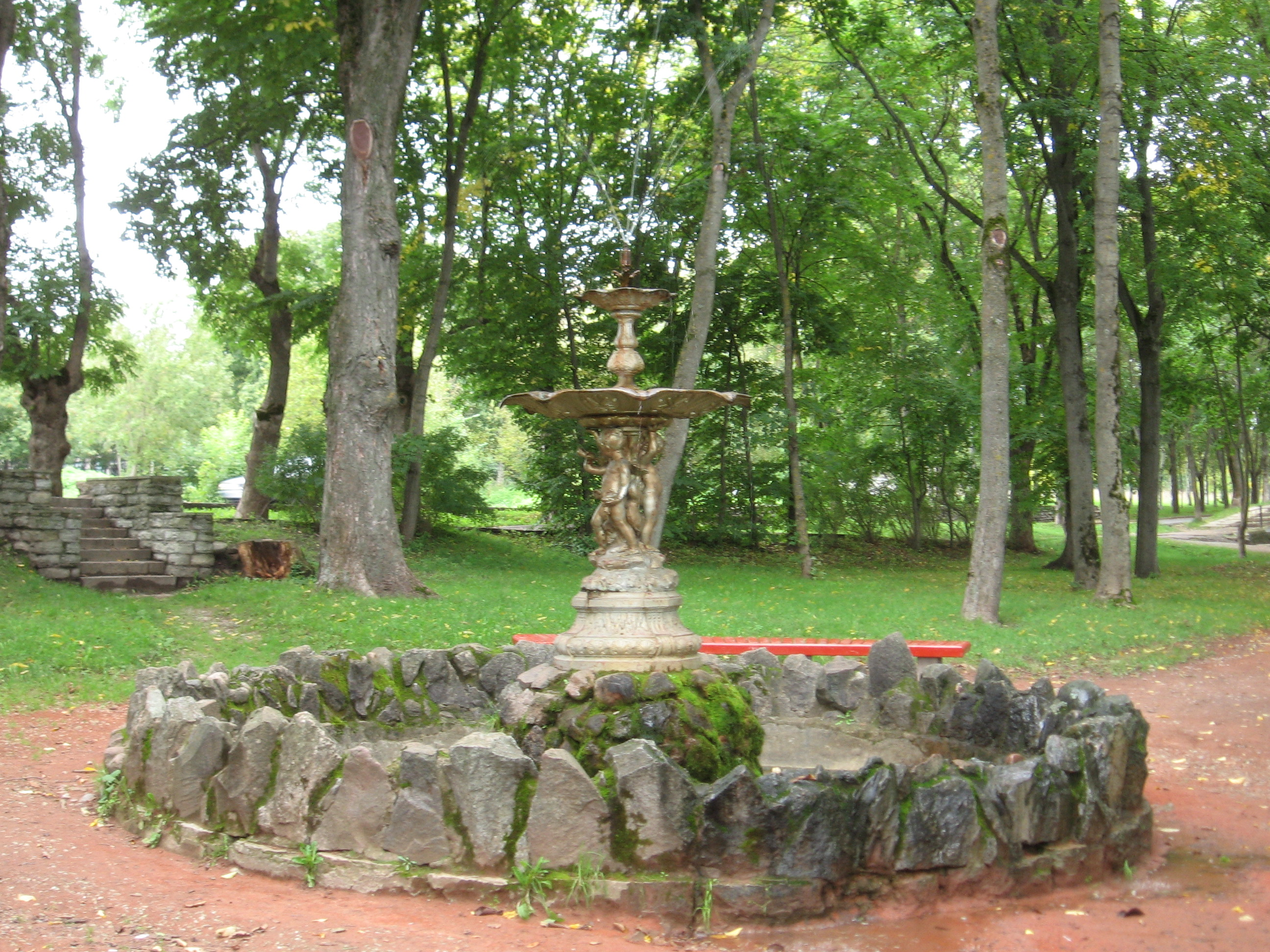 Purskkaev Narvas bastionil Pax